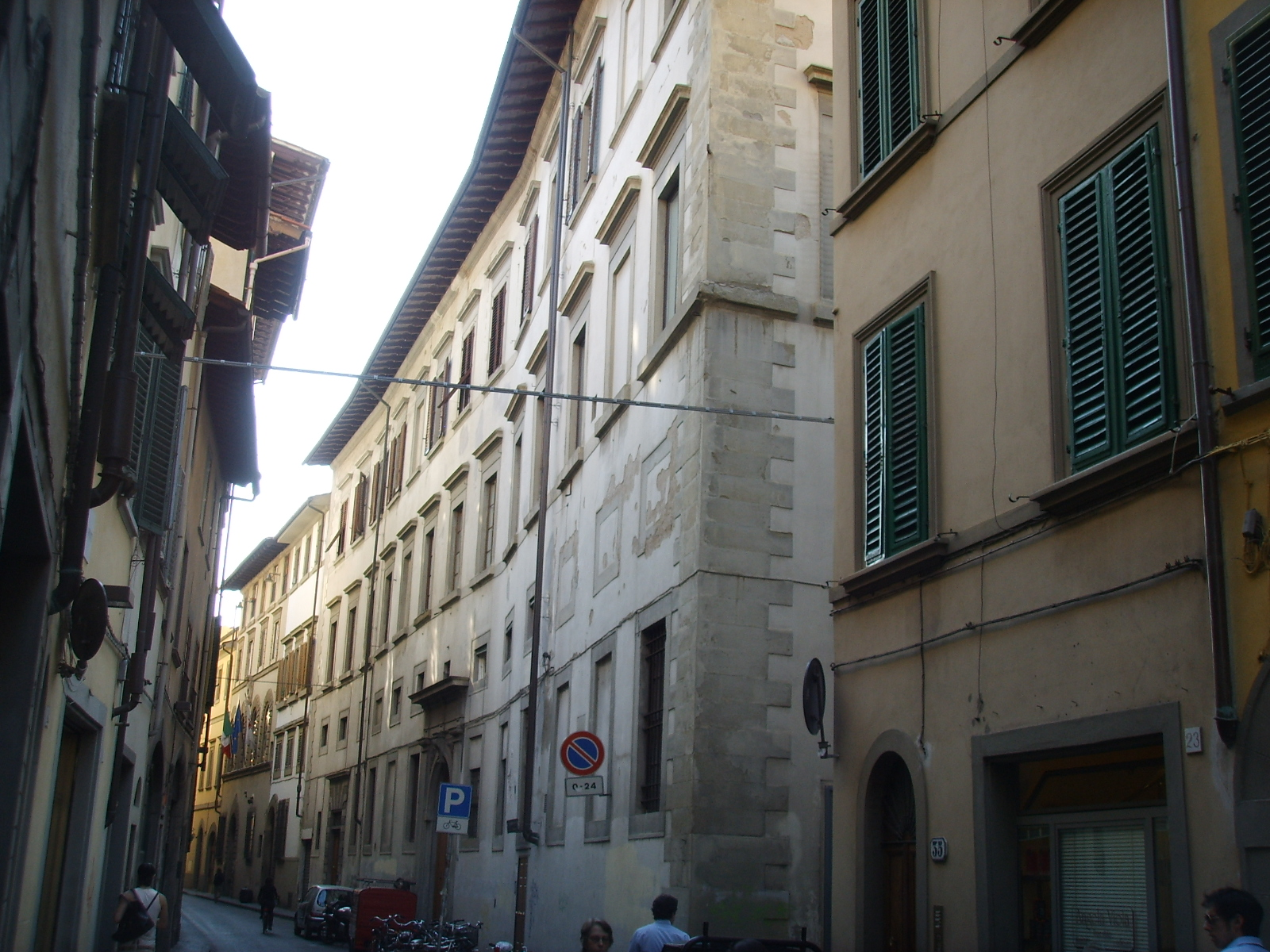 Palazzo_caccini in Florence